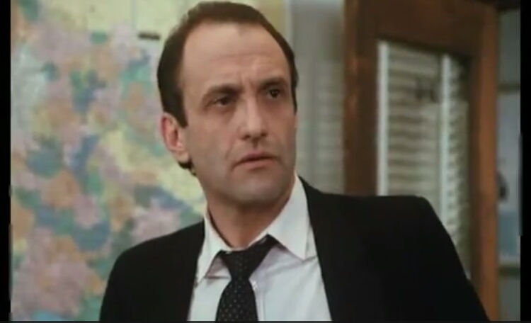 Robert Kerman dans Rick Hunter